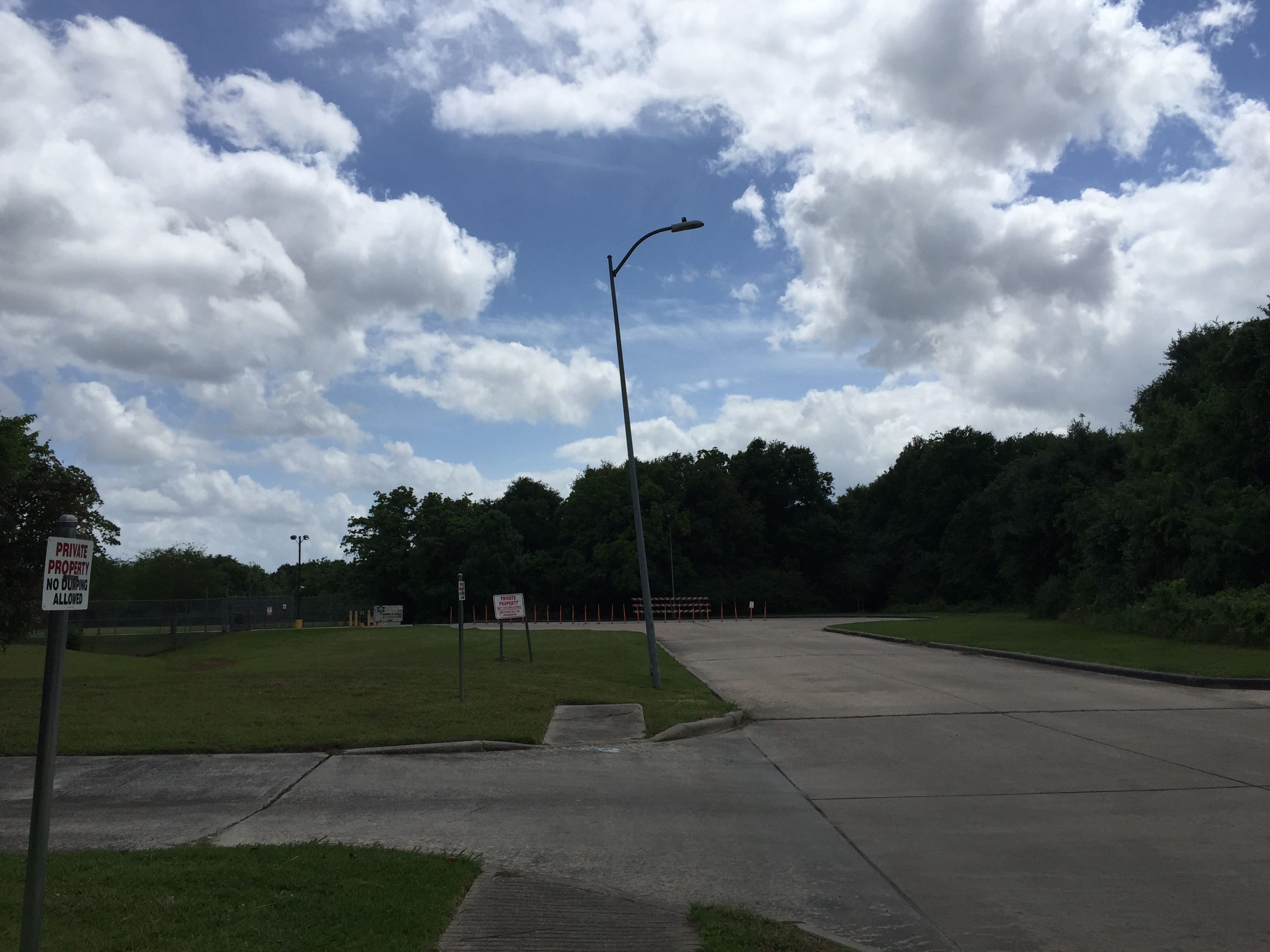 Robert M. Beren